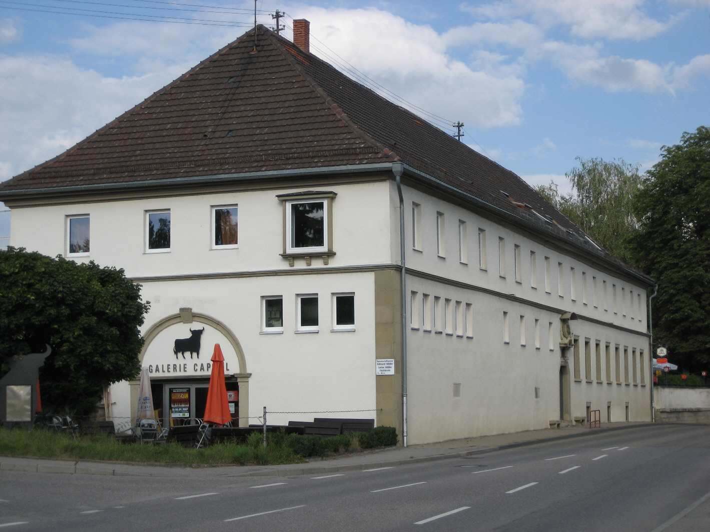 Cappel(Hohenlohe), Brauerei